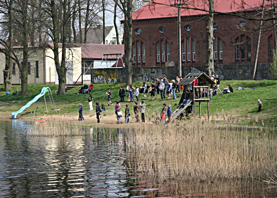 Jezioro Młyńskie wschodni brzeg